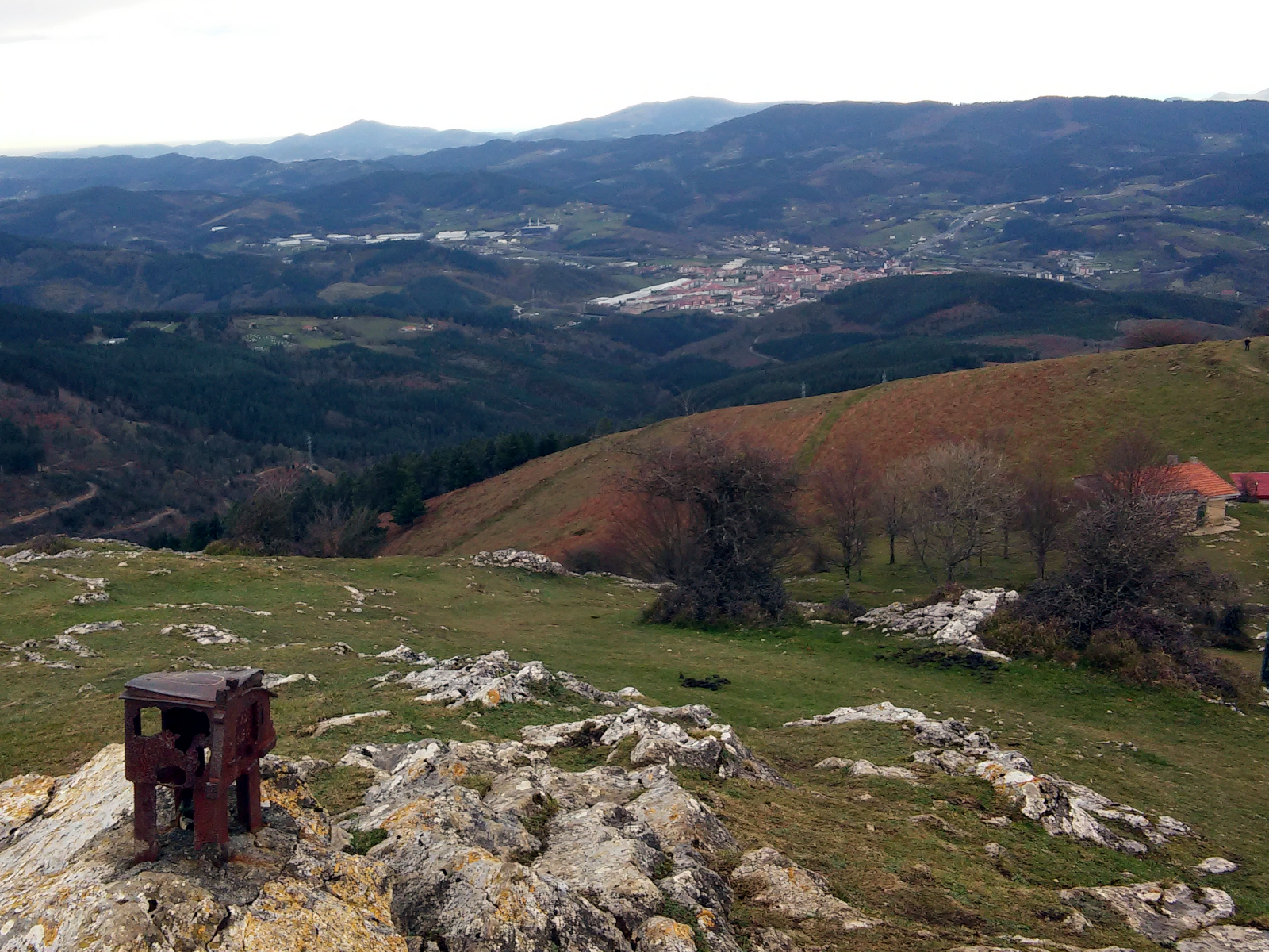 Zornotza Belatxikietatik